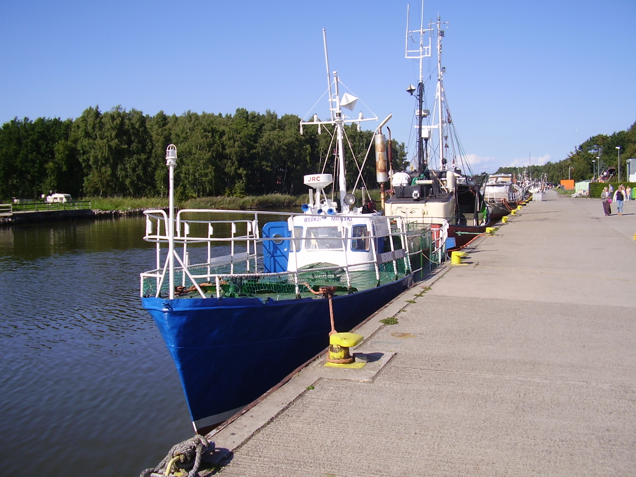 Port w Łebie)